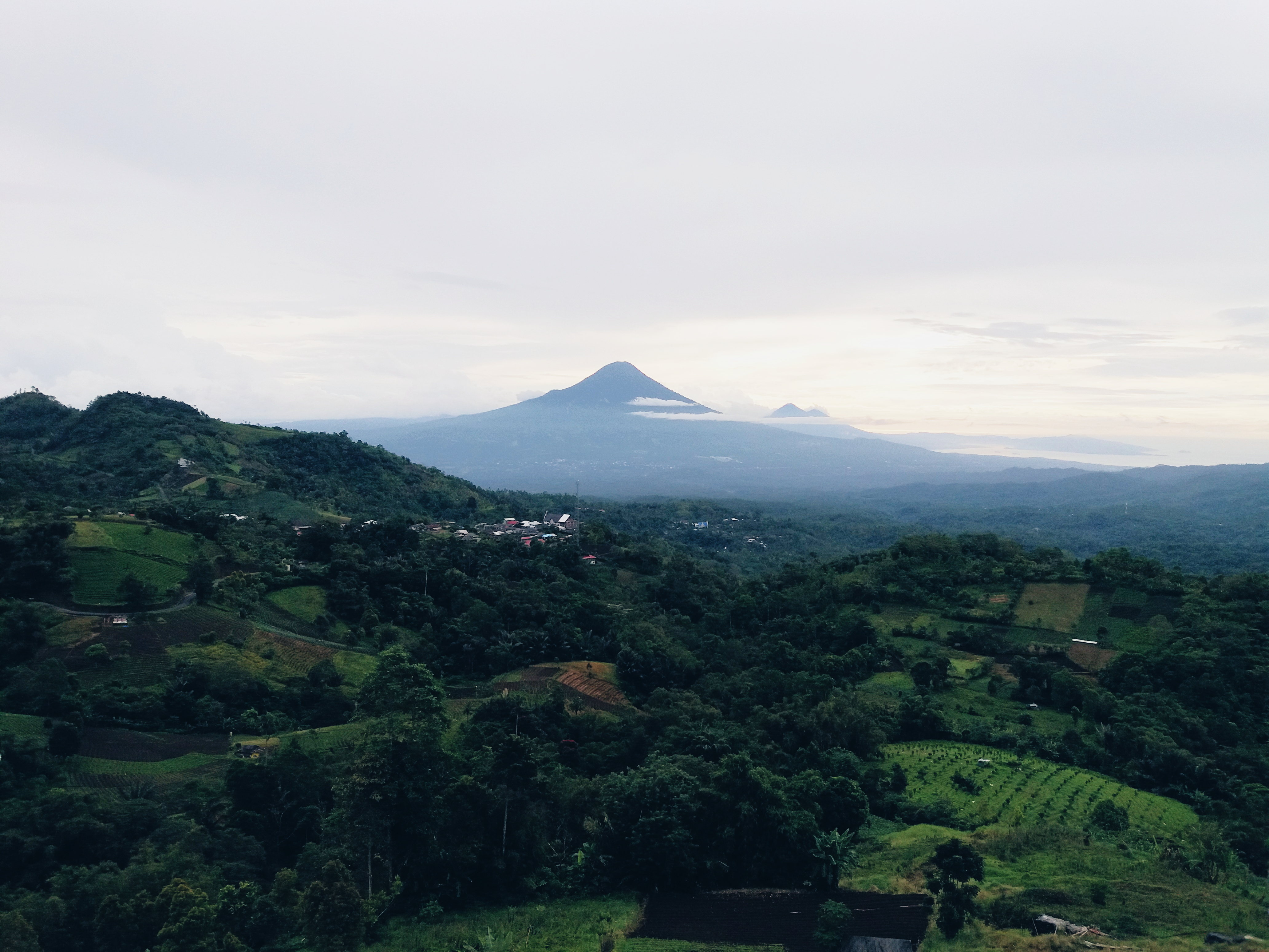 Pemandangan Alam yang bersih segar dan indah.